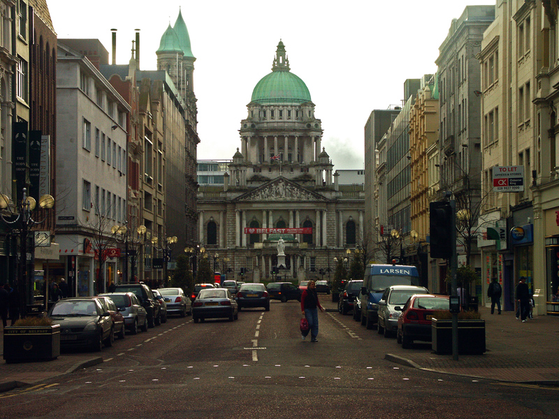 City Hall im Zentrum Belfasts von der Royal Avenue aus. Datum: 30.01.2005